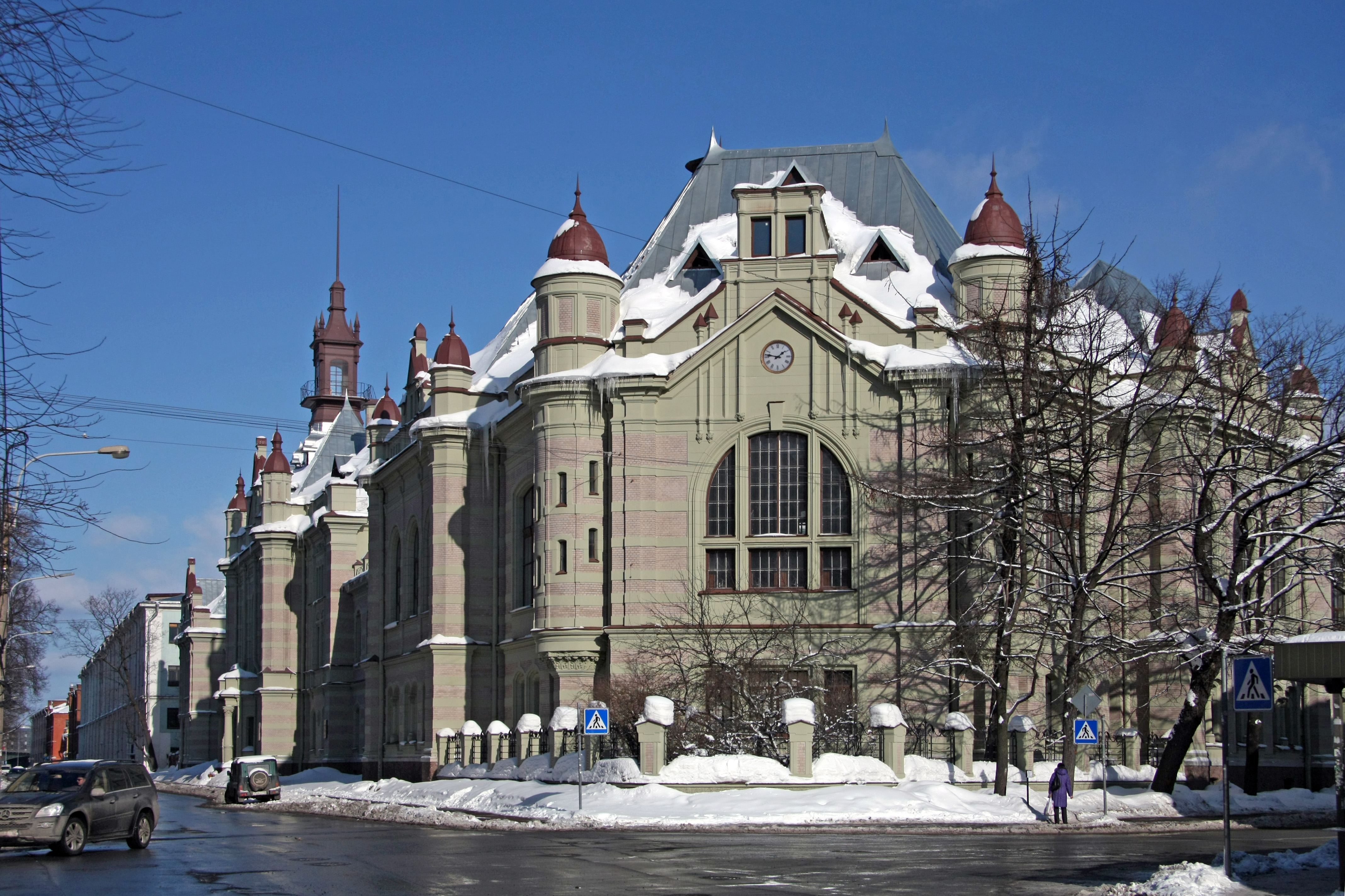 Электротехнический институт, в котором в 1905-1907 гг. бывал В.И. Ленин: улица Профессора Попова, 5, Аптекарский проспект, 3, Петроградский район, Санкт-Петербург